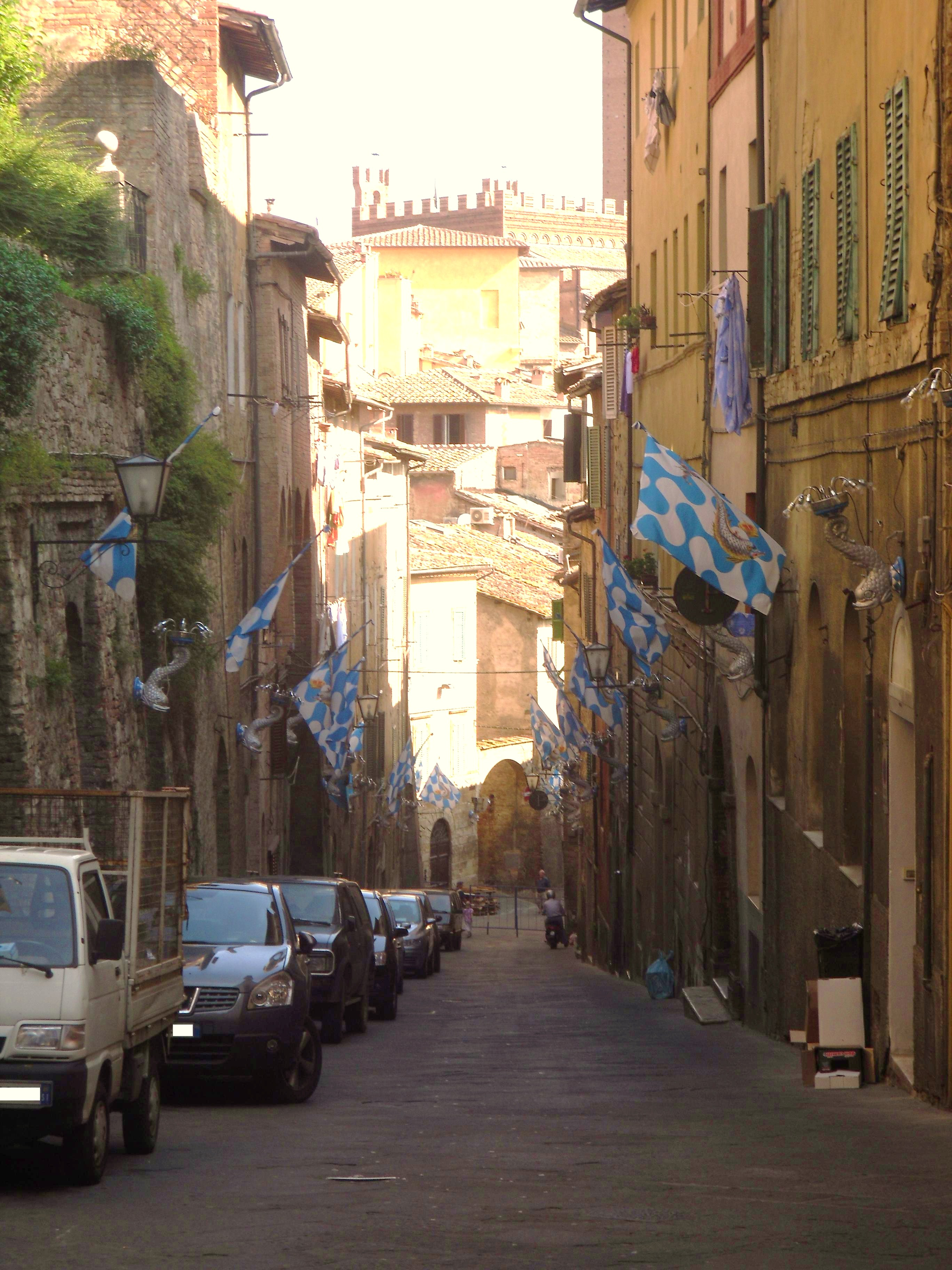 Bandiere della Contrada Capitana dell'Onda in Via Giovanni Duprè (Siena, Italia)